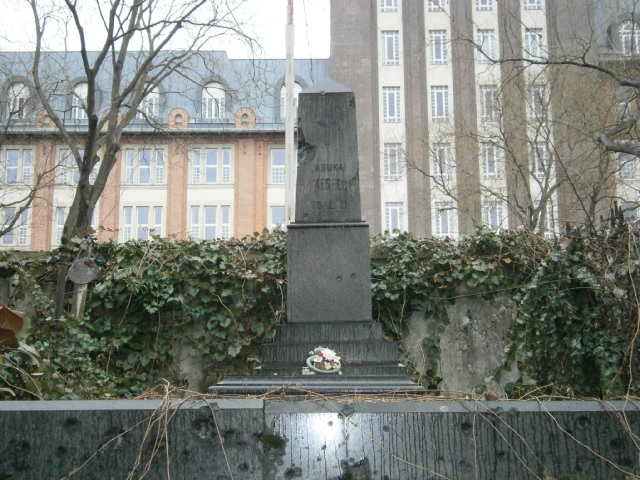 Családi sírbolt, Budapest, Fiumei úti sírkert